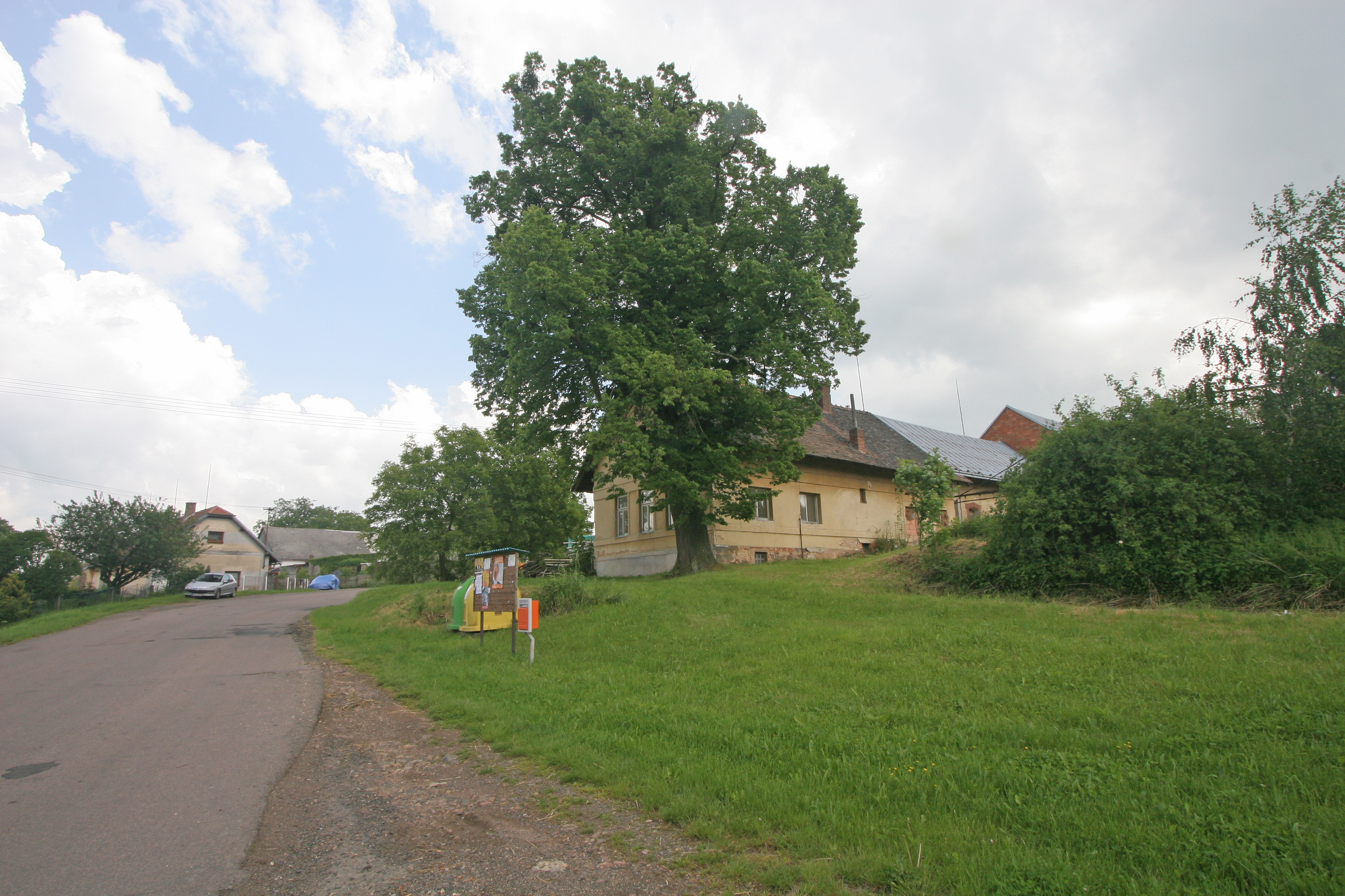 Mladoňovice čp. 2